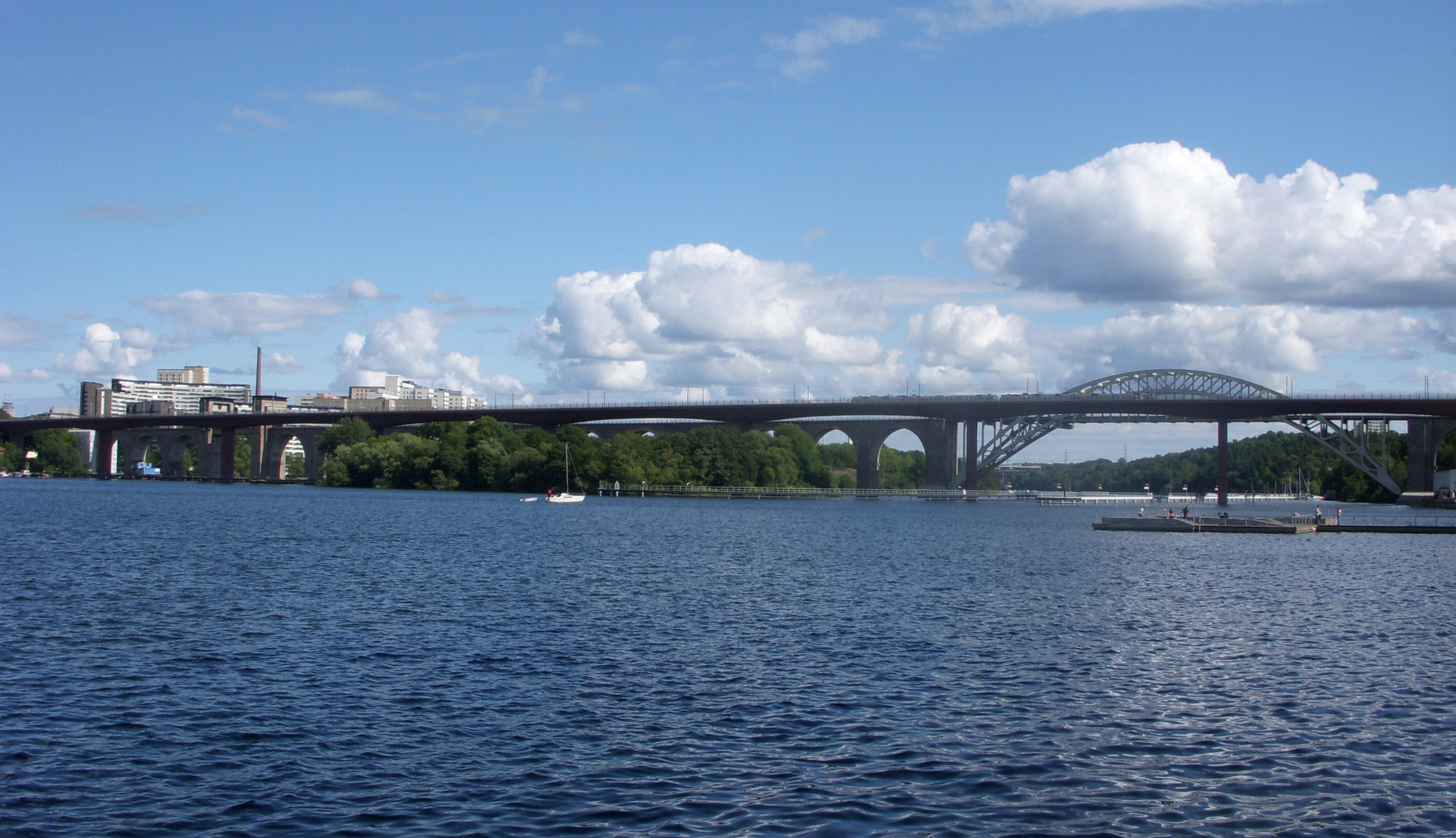 Årstabroarna in Stockholm gesehen von Liljeholmen